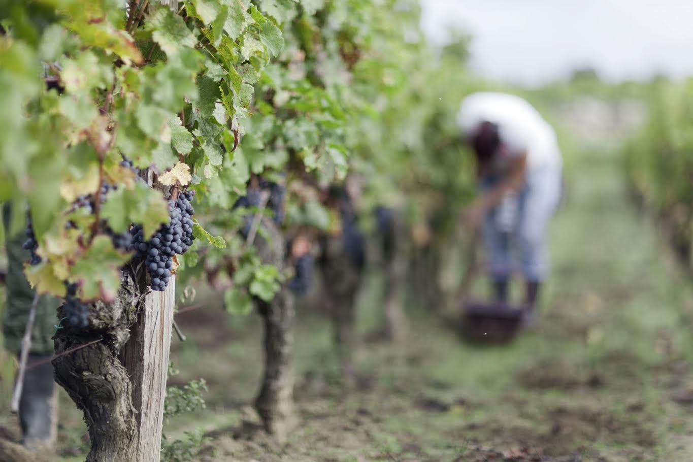 Vendanges au château de La Dauphine